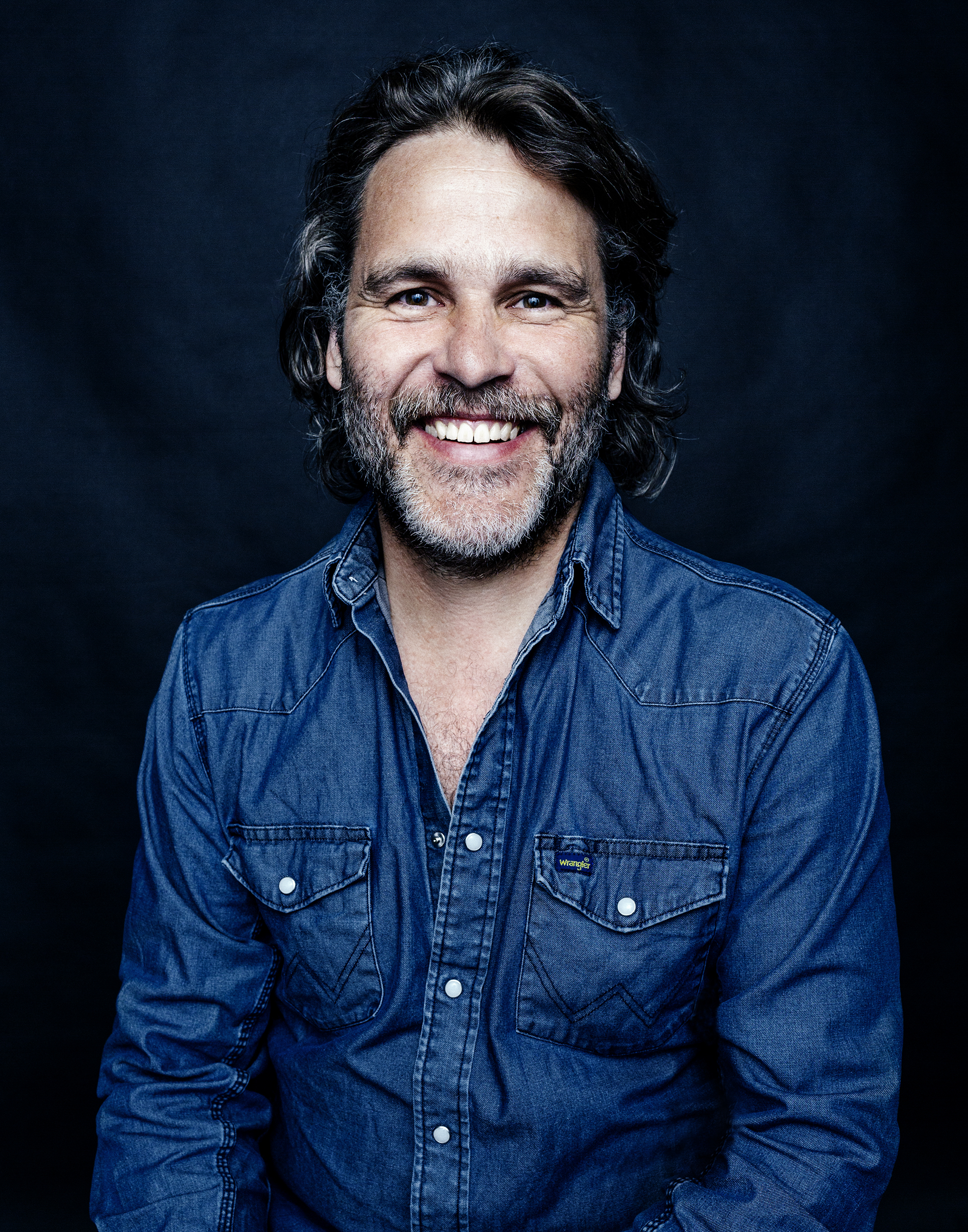 Programledaren Erik Haag.